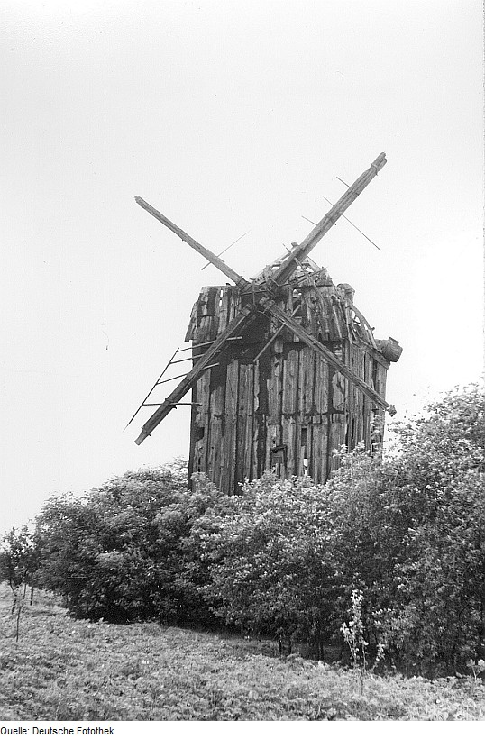 Original image description from the Deutsche Fotothek Klein Schwechten. Bockmühle, ruinös